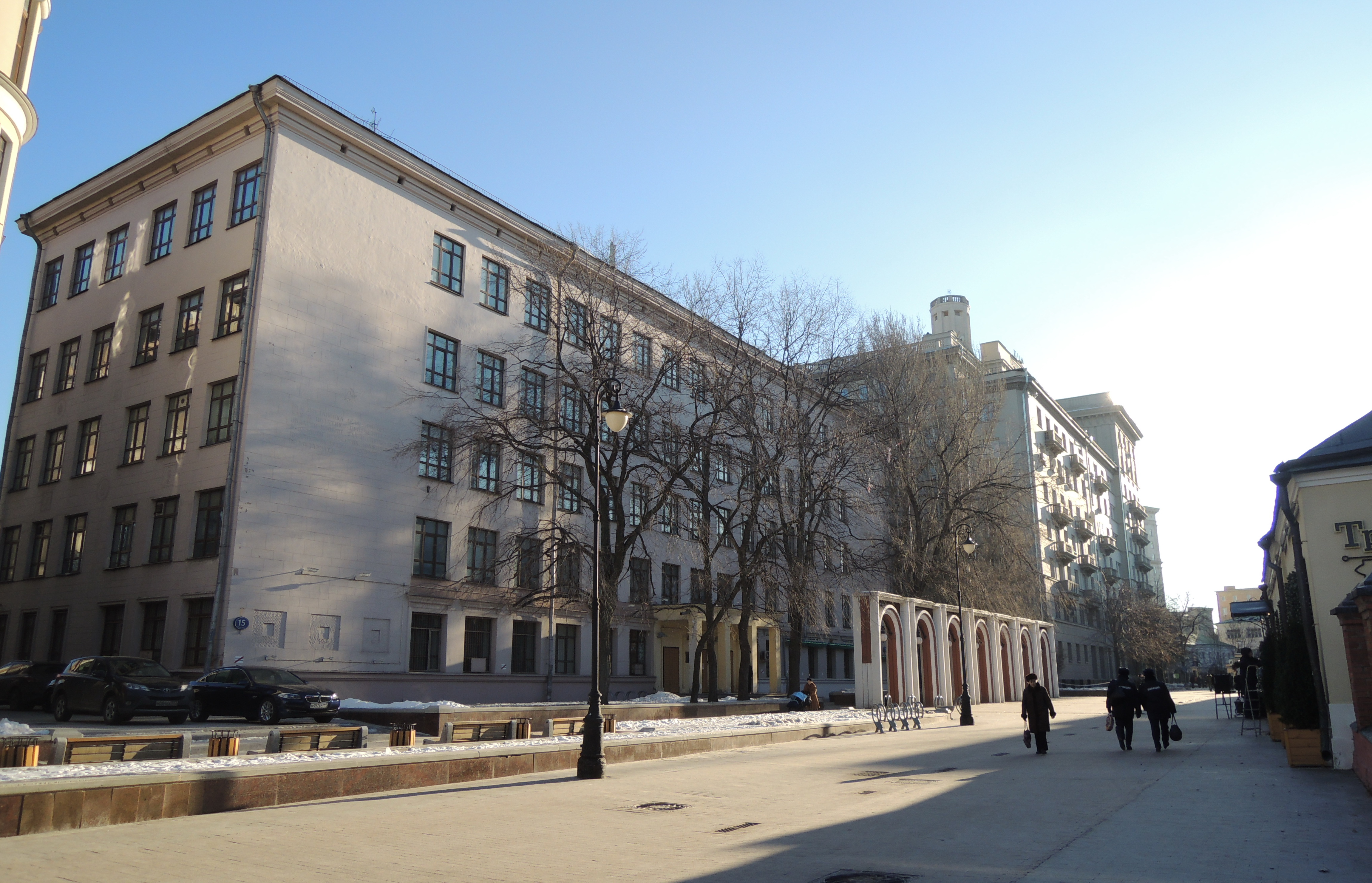 Лаврушинский пер., 15 строение 1 Факультет графики МГАХИ им. В.И. Сурикова (Москва)